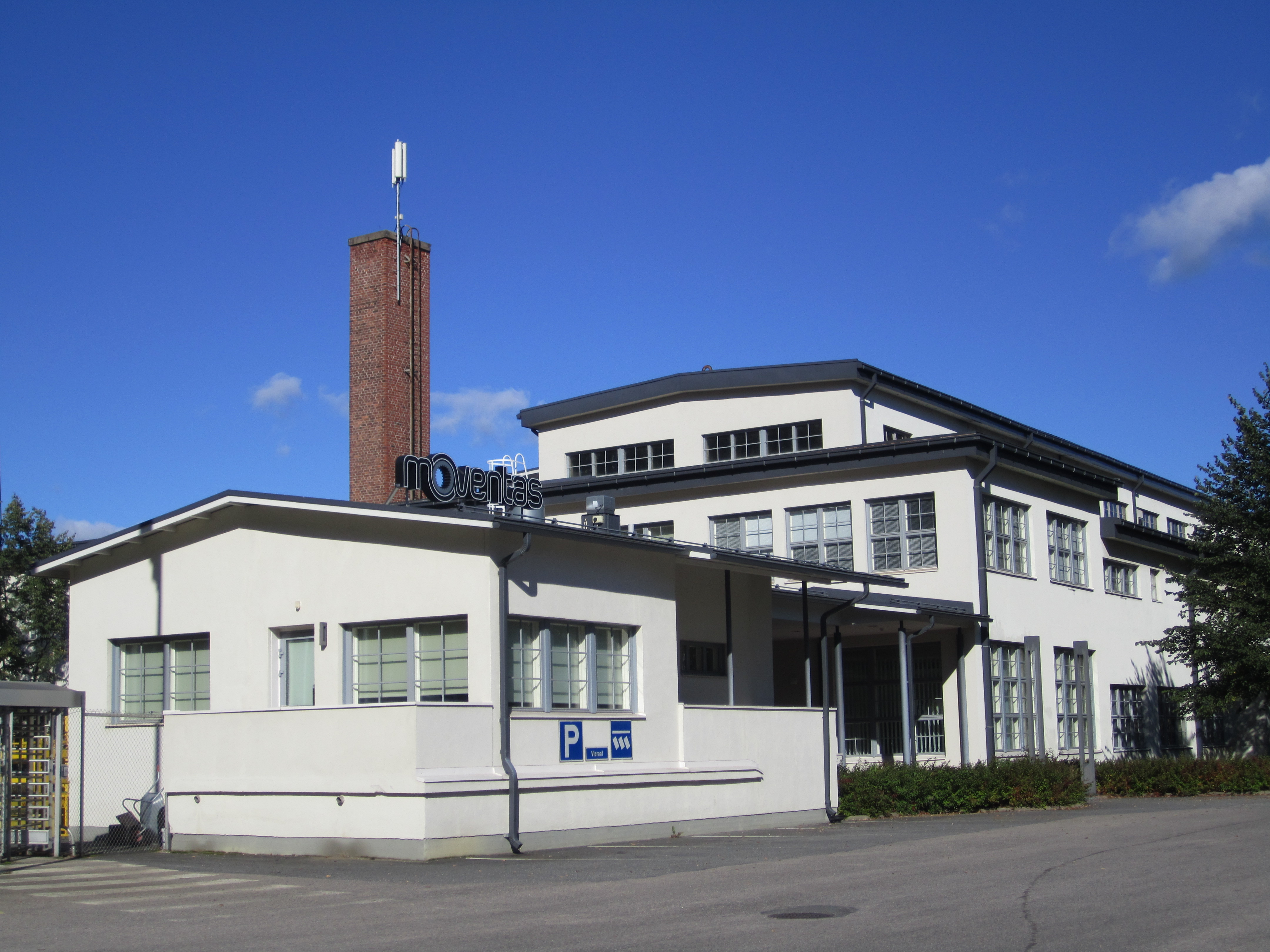 Moventaksen toimitilat Jyväskylässä, Suomessa.